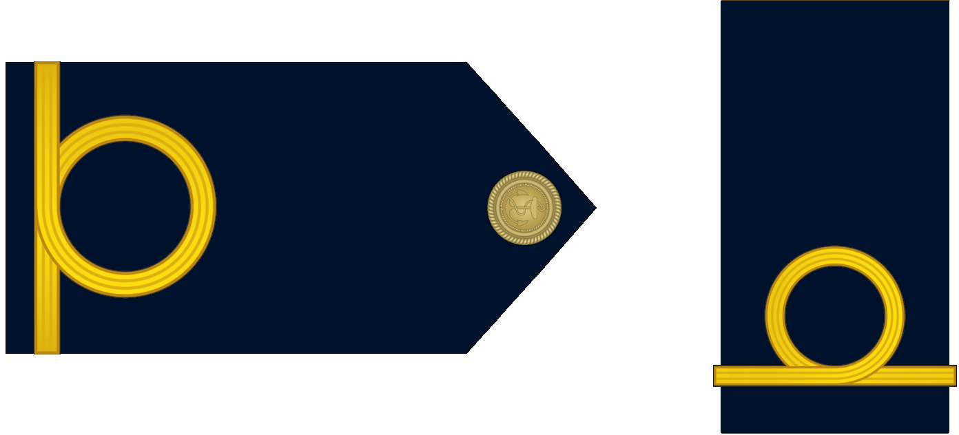 Charretera de Guardiamrina